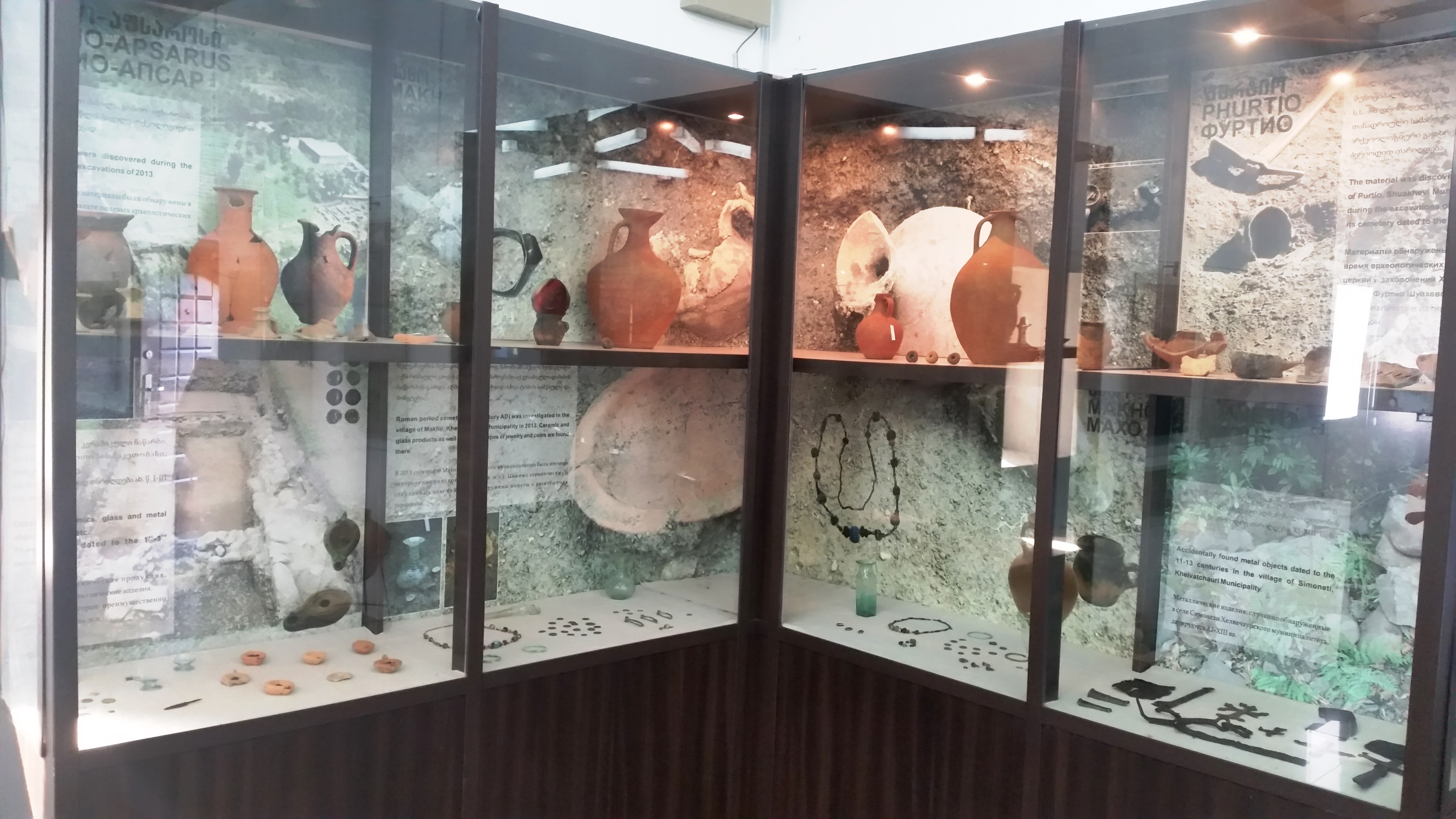 გონიოს ციხის მუზეუმის ერთი კომპოზიცია